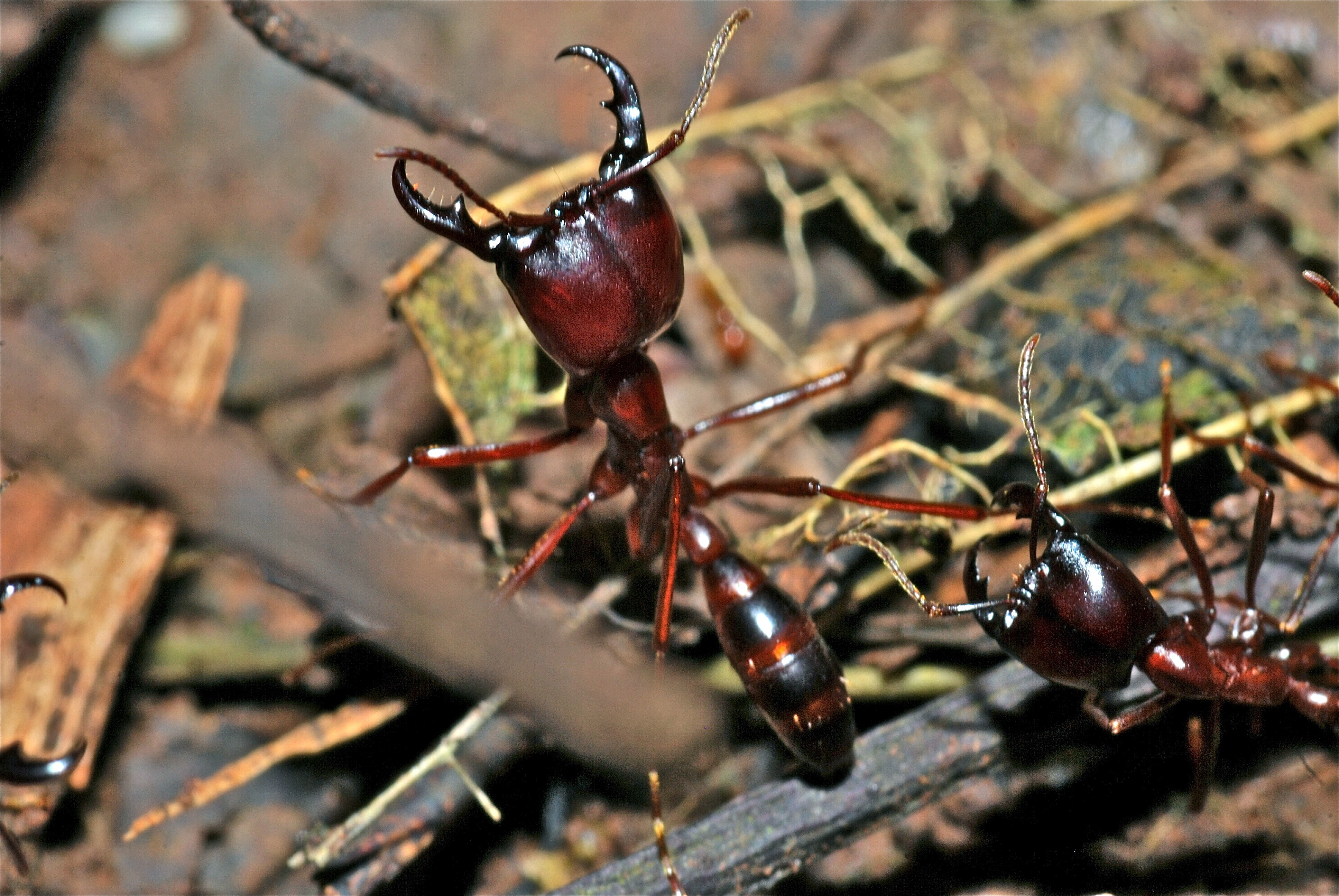 Mabira Forest, UGANDA